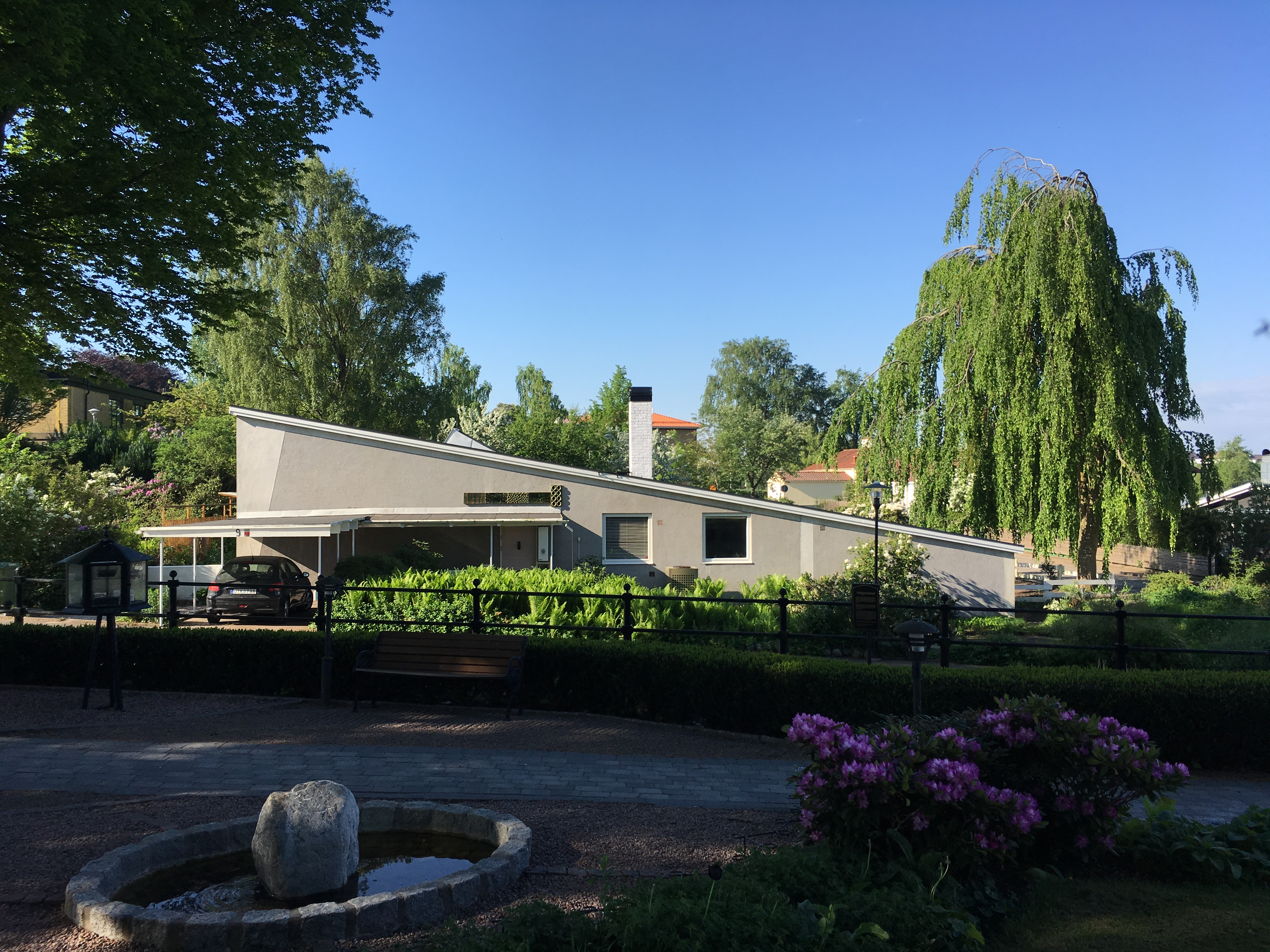 Skidbacken(Doktorn 5)